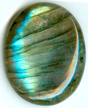 Лабрадор, обработанный кабошёном.Лабрадор, обработанный в форме кабошёна. 2,5см. Фото/коллекция: Виктор Слётов